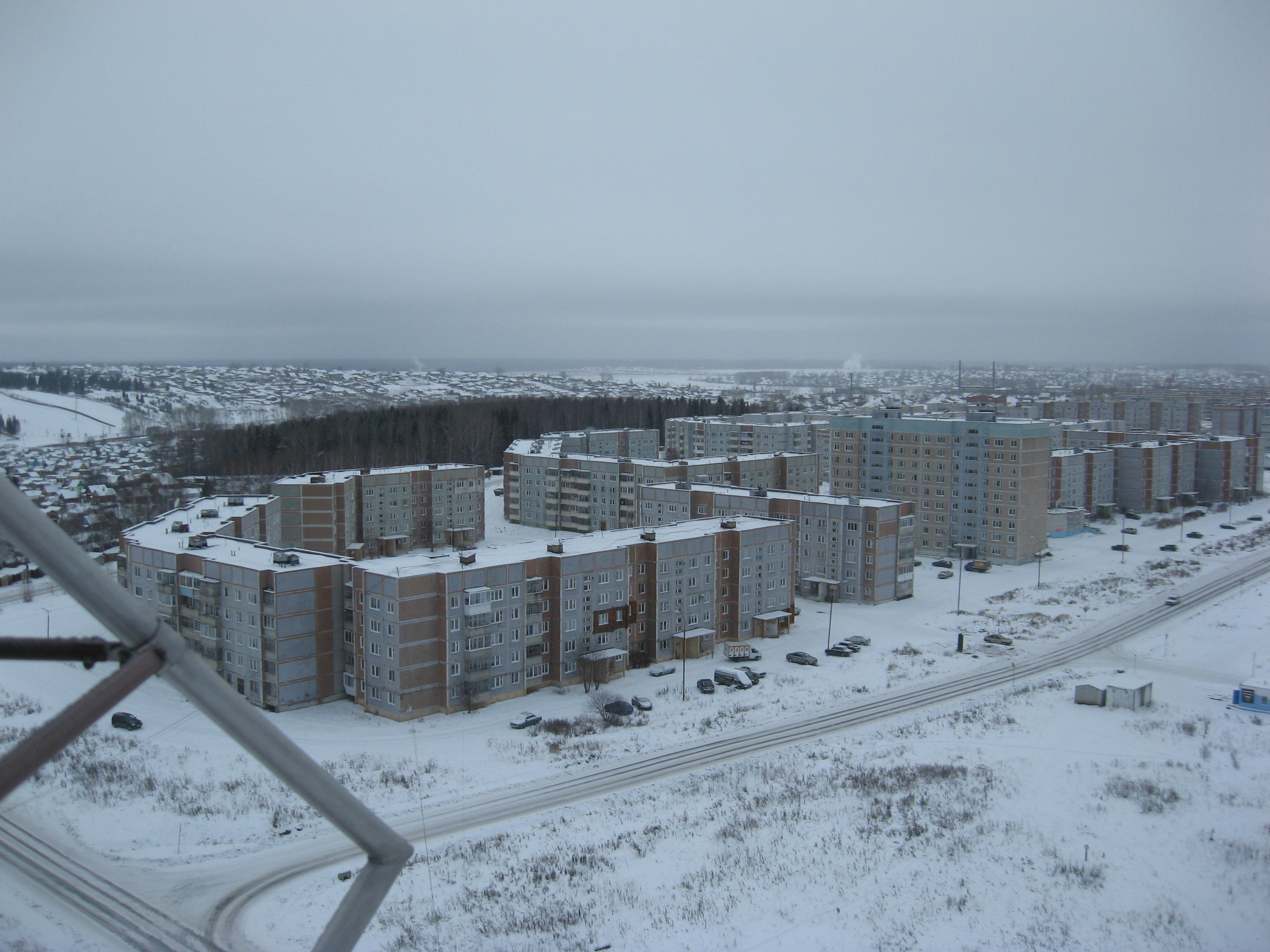 Вид с вышки